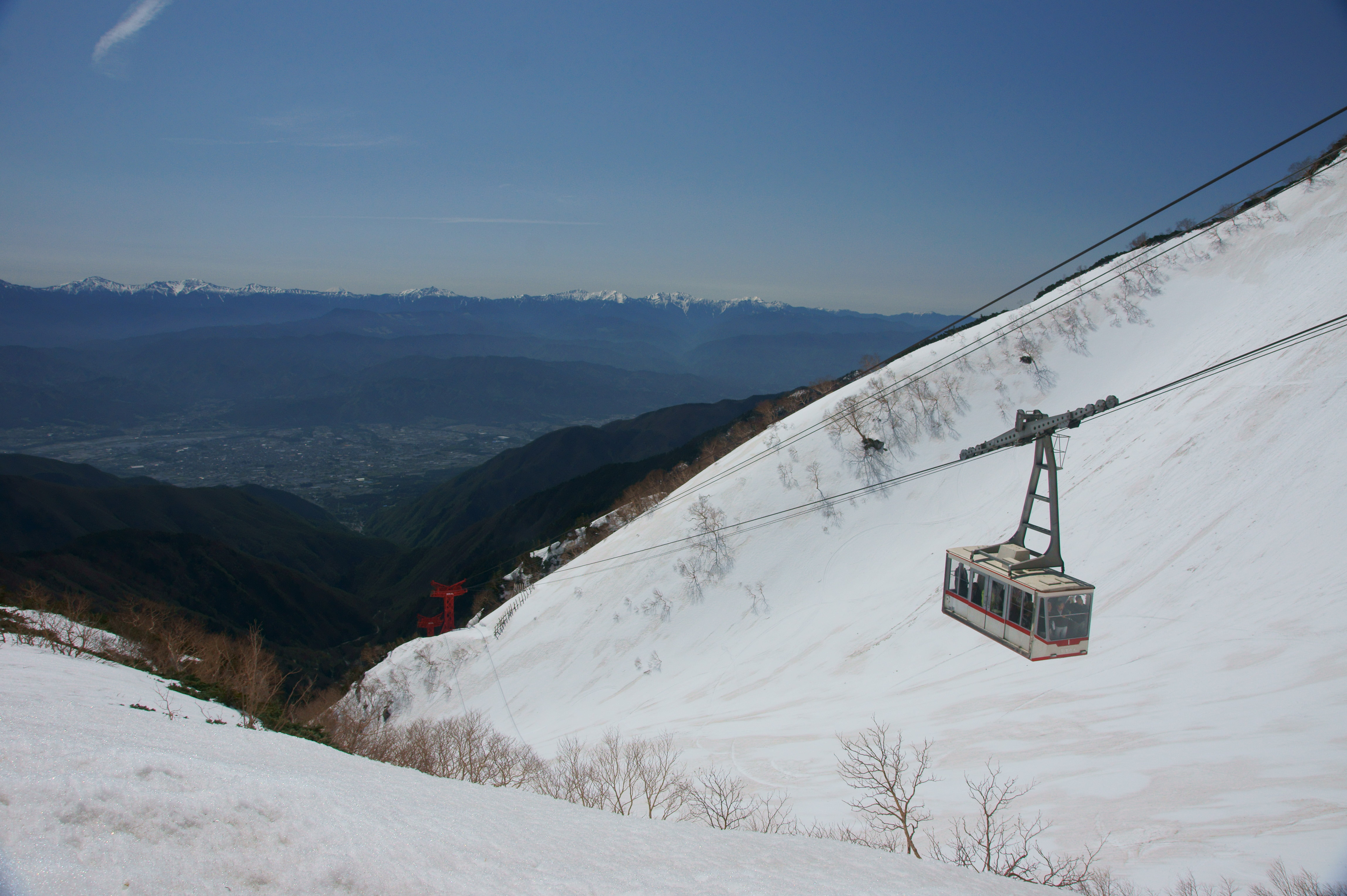 長野県の駒ヶ岳ロープウェイ。